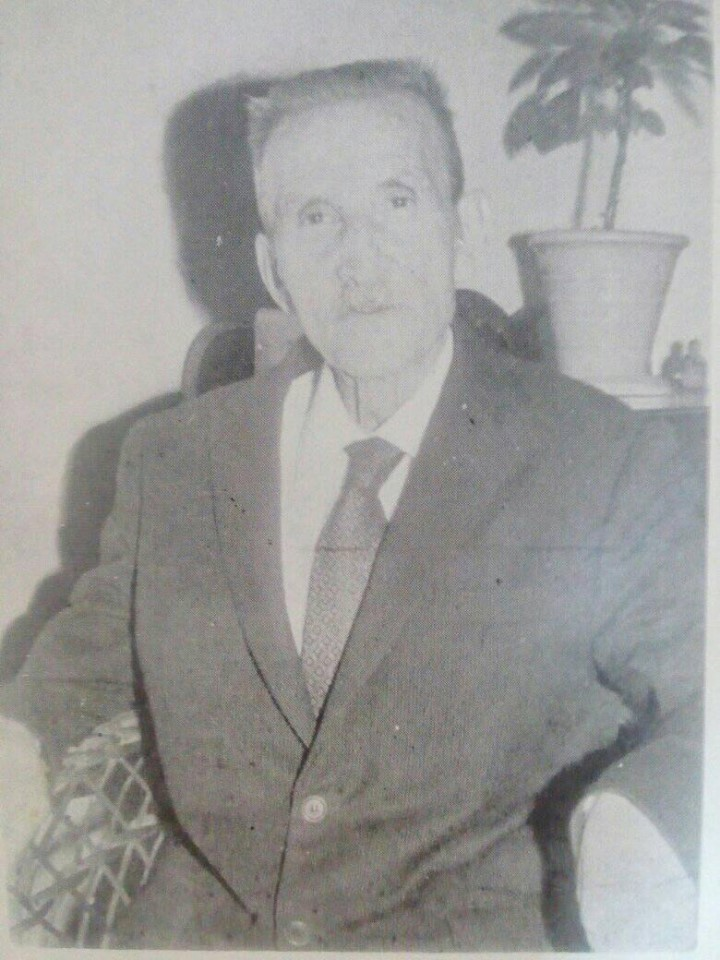 Poeta palentino